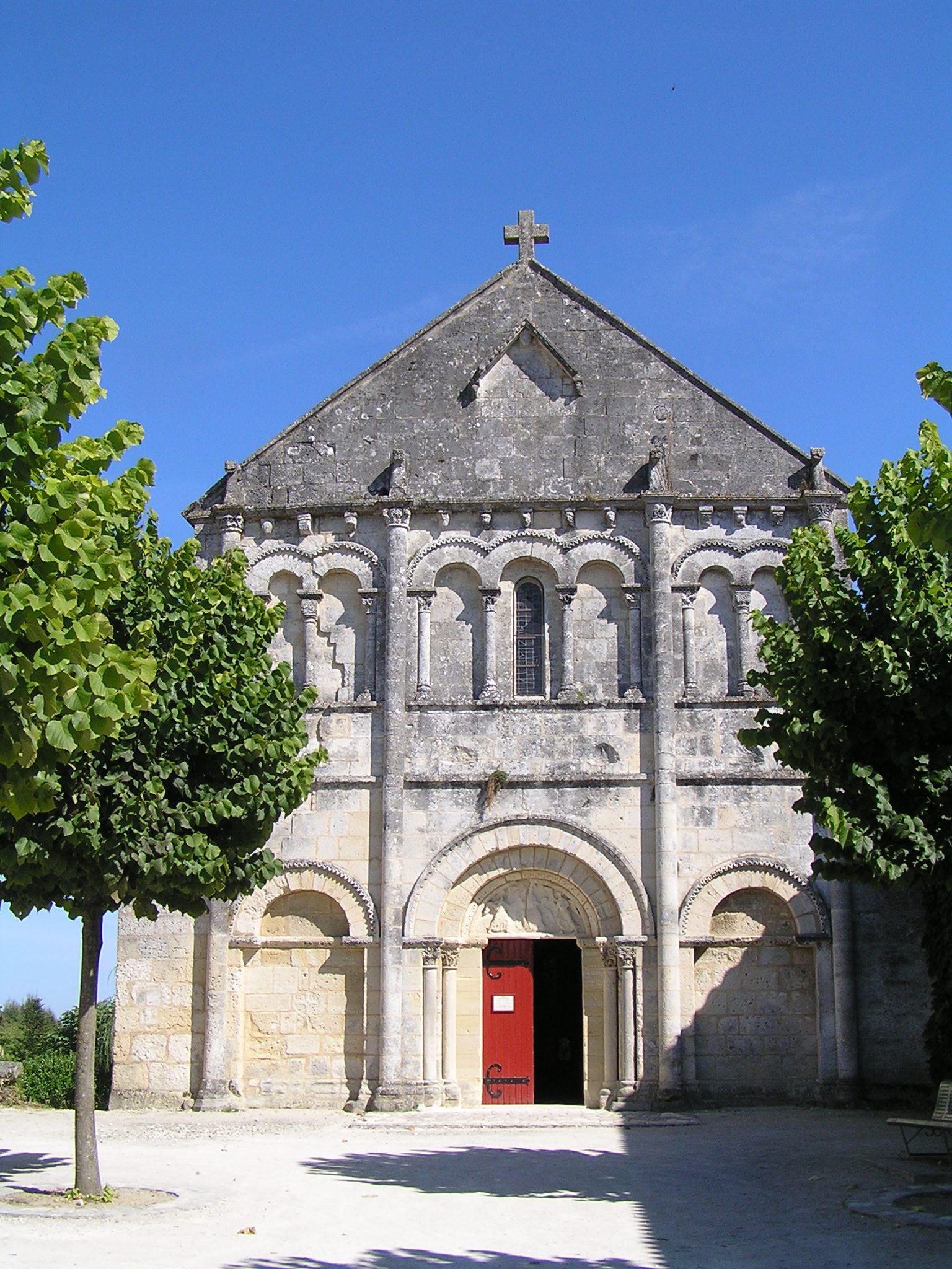 église de Linars, Charente, France